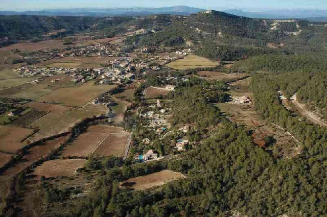 Vue aérienne de Lauret (Hérault)